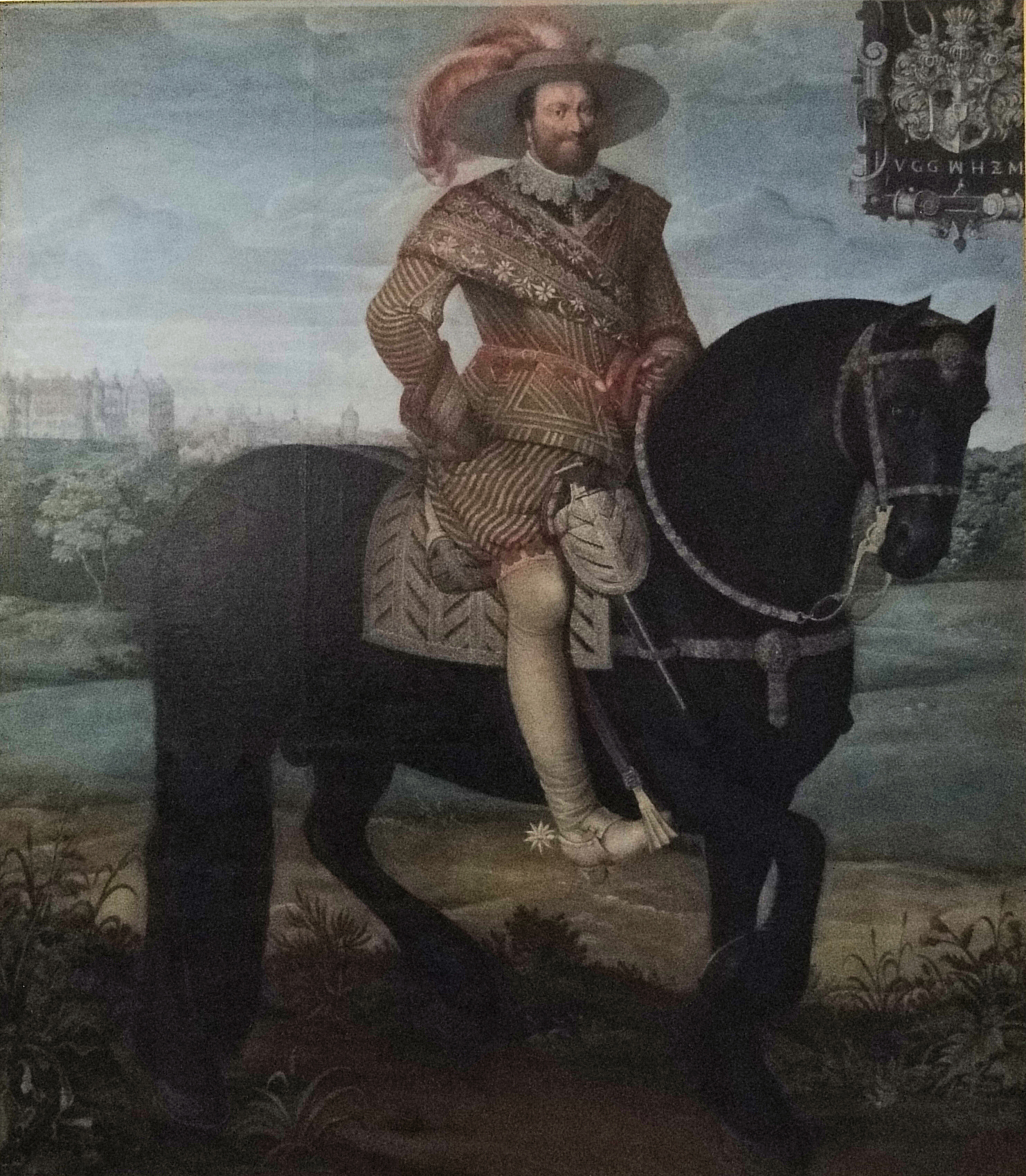 Reitergemälde mit Johann Albrecht II, Herzog zu Mecklenburg. Öl auf Leinwand. Das Gemälde entstand nach Rückkehr des Herzogs aus dem von Wallenstein auferlegten Exil. Der Herzog liess sich als Garant für den Frieden vor Schloss und Stadt Güstrow abbilden. Zu erkennen ist eine Turnierbahn parallel zum Südflügel des Schlosses.